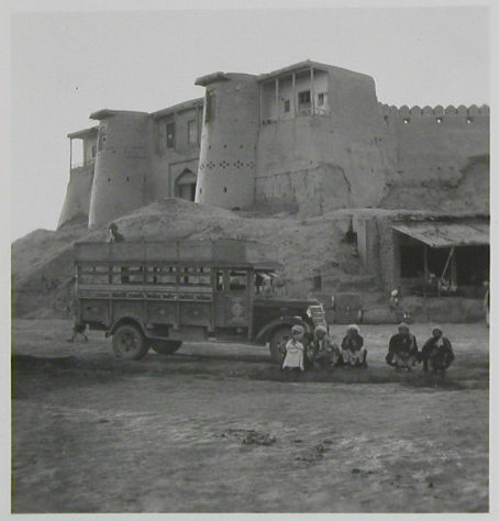 Afghanistan, Andkhoi (Andkhoy, Andkhvoy) / Akché (Aqcheh, Aqchah): Menschen; Karteikarte: Lastwagen vor einer Burg / Sitzende Männer vor einem Haus